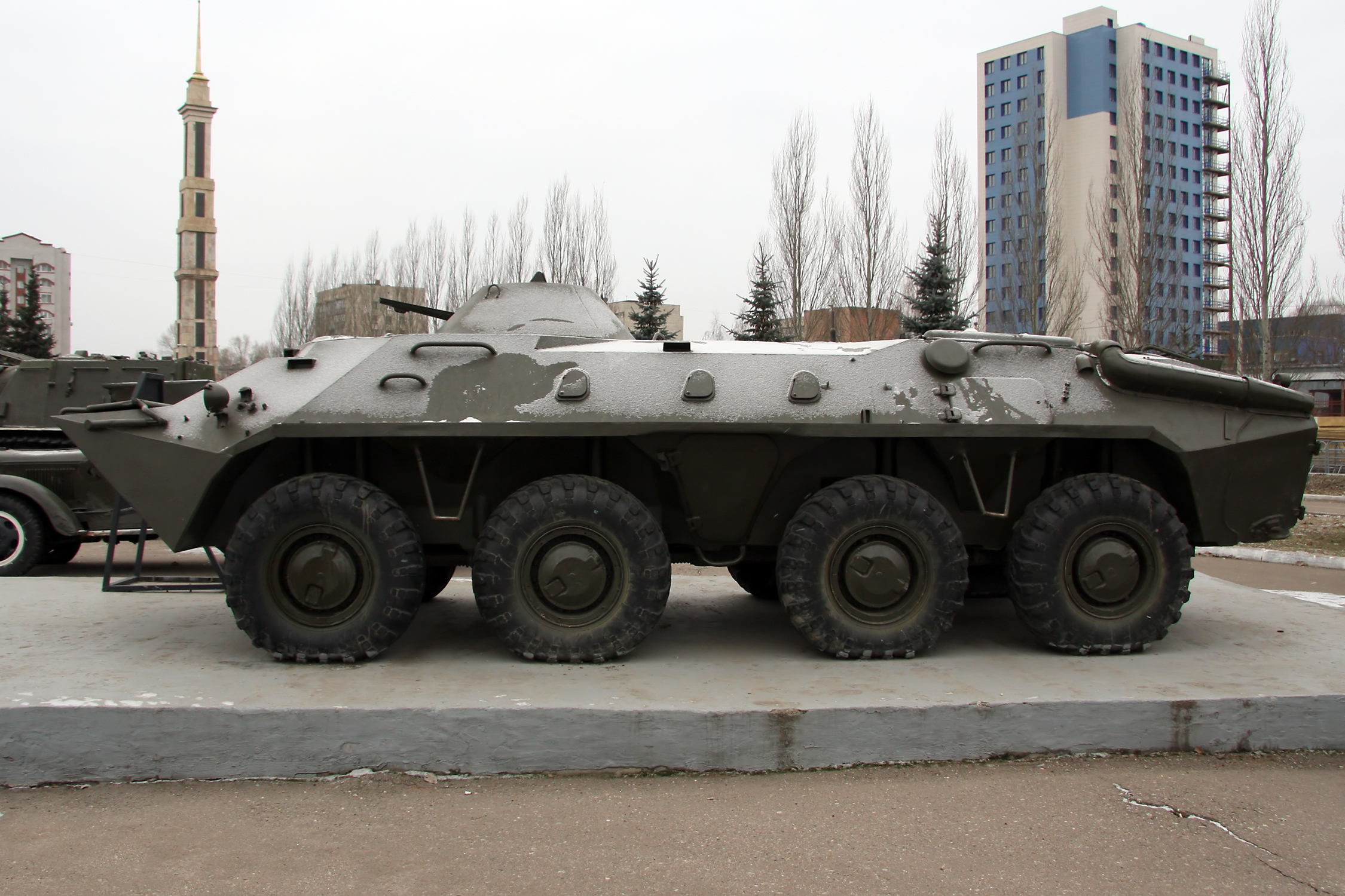 БТР-70 (BTR-70)